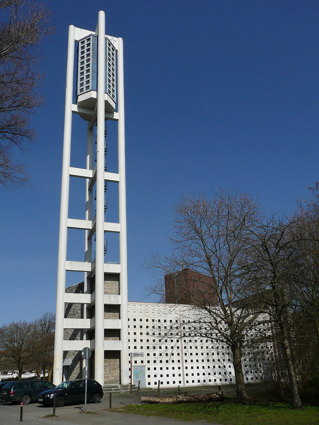 Bugenhagenkirche (Hannover)